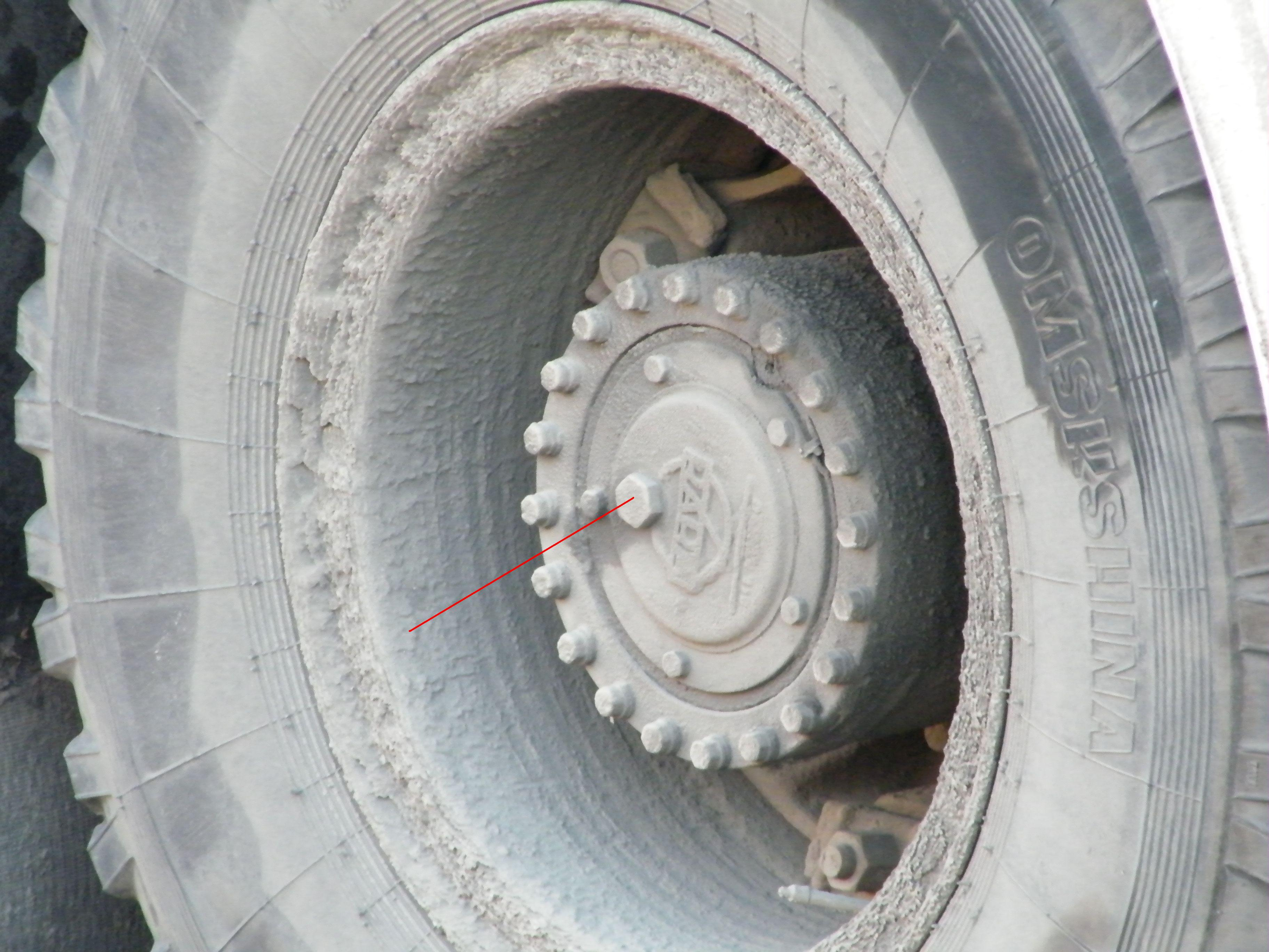 Троллейбус, планетарный редуктор заднего ведущего моста. Указано отверстие для заливки трансмиссионного масла (закрыто резьбовой пробкой).